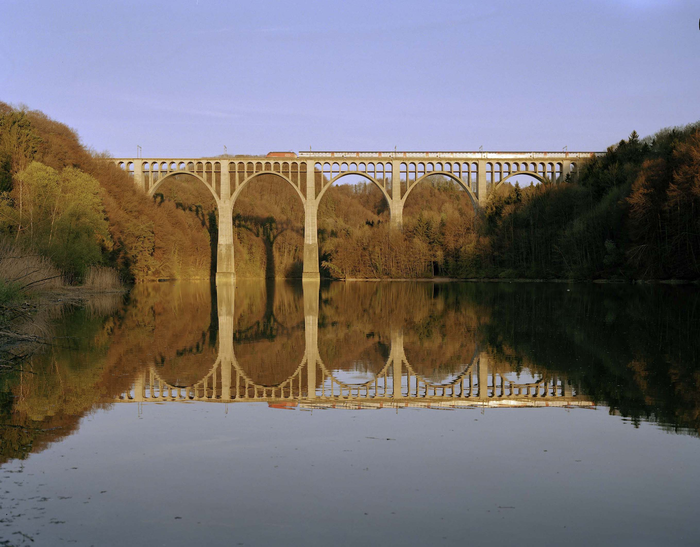 Neue Grandfey-Brücke